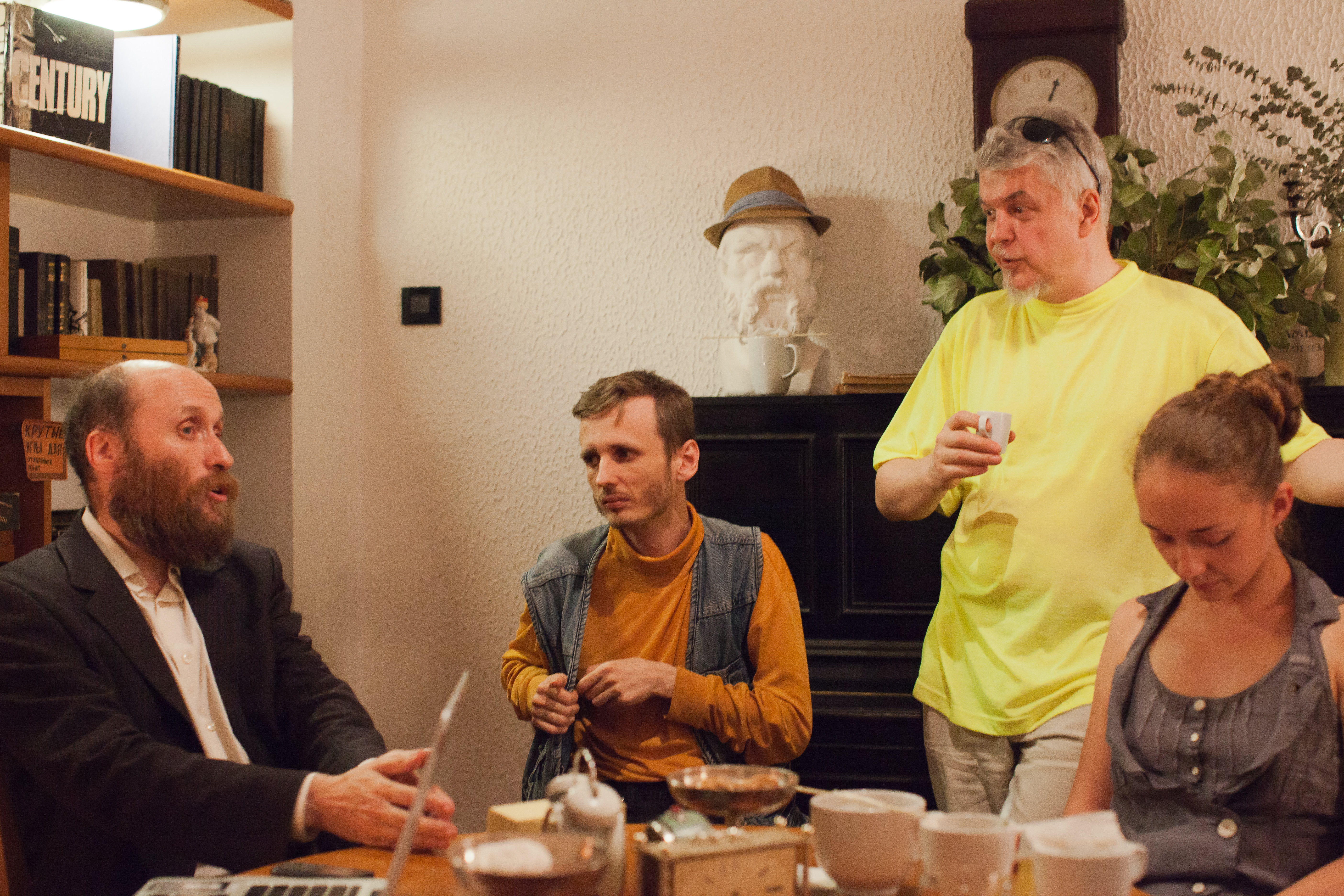 Конвент Пиратской партии России в антикафе Циферблат